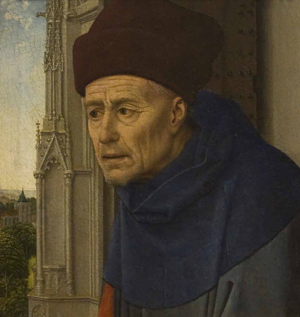 =een deel van een opgedeeld origineel, zie Maria Magdalena leest